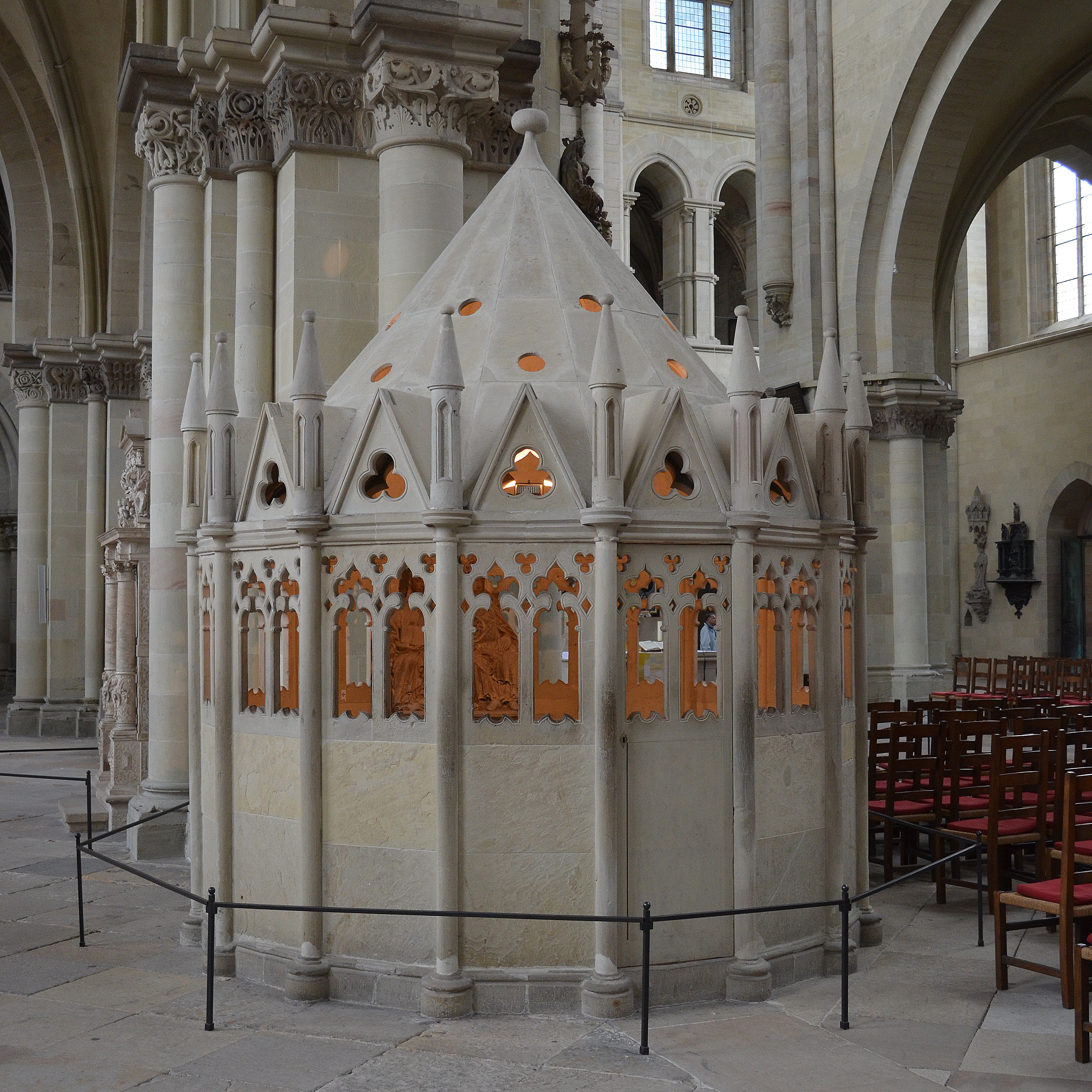 Maagdenburg, domkerk, kapel